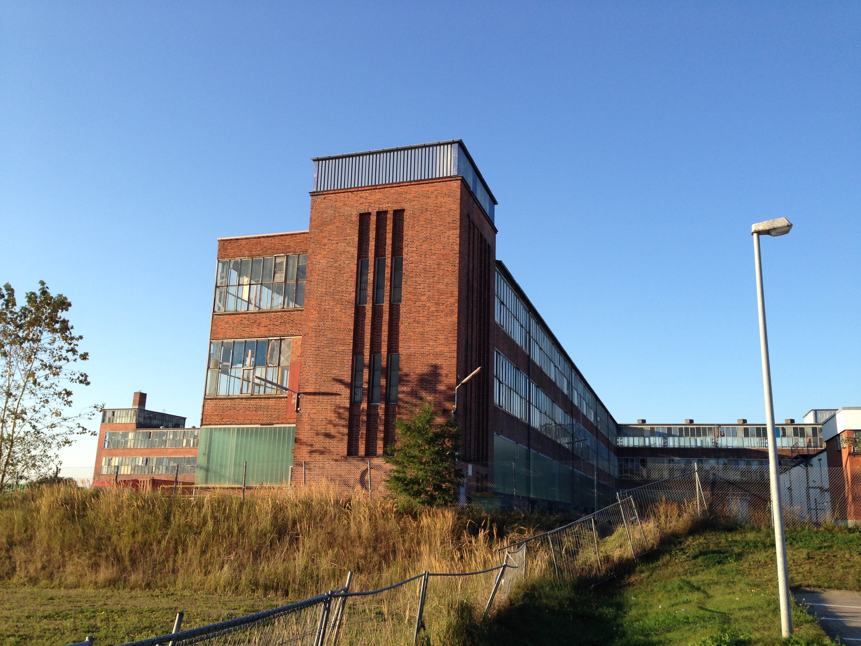 Fabrikgebäude am Glashüttenweg in Lübeck